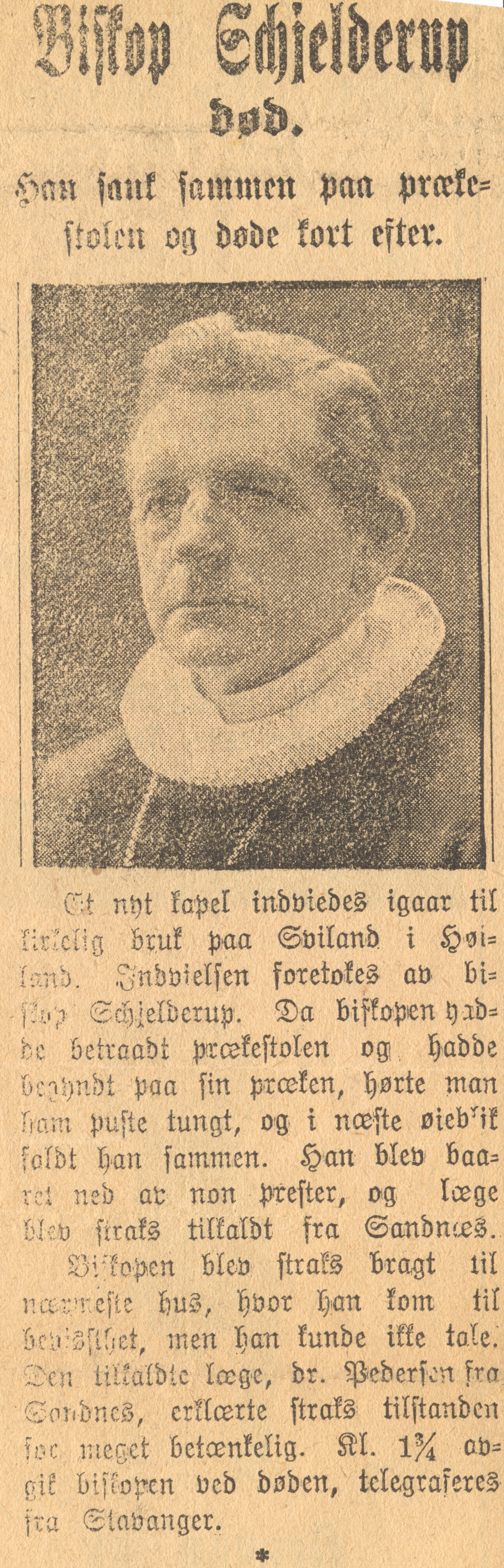 Avisartikkel fra ukjent avis